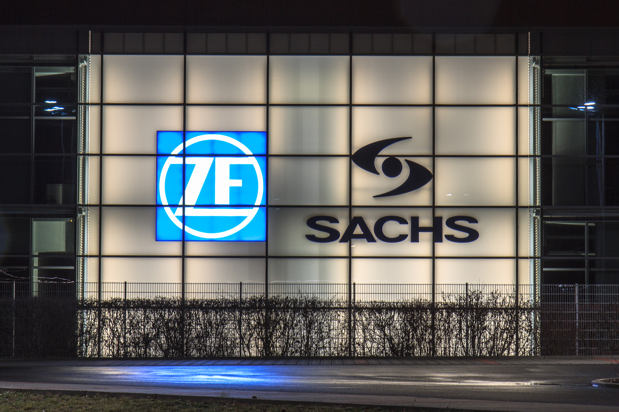 Logo der ZF Sachs am Hauptwerk in Schweinfurt